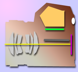 Este esquema es obra mia. I'm the autor. Esta es la versión correcta. En la versión anterior de la imagen olvide subier el espejo, si no se sube el espejo, la luz no puede llegar al negativo, rebota (se refleja).